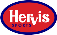 hervis lógója